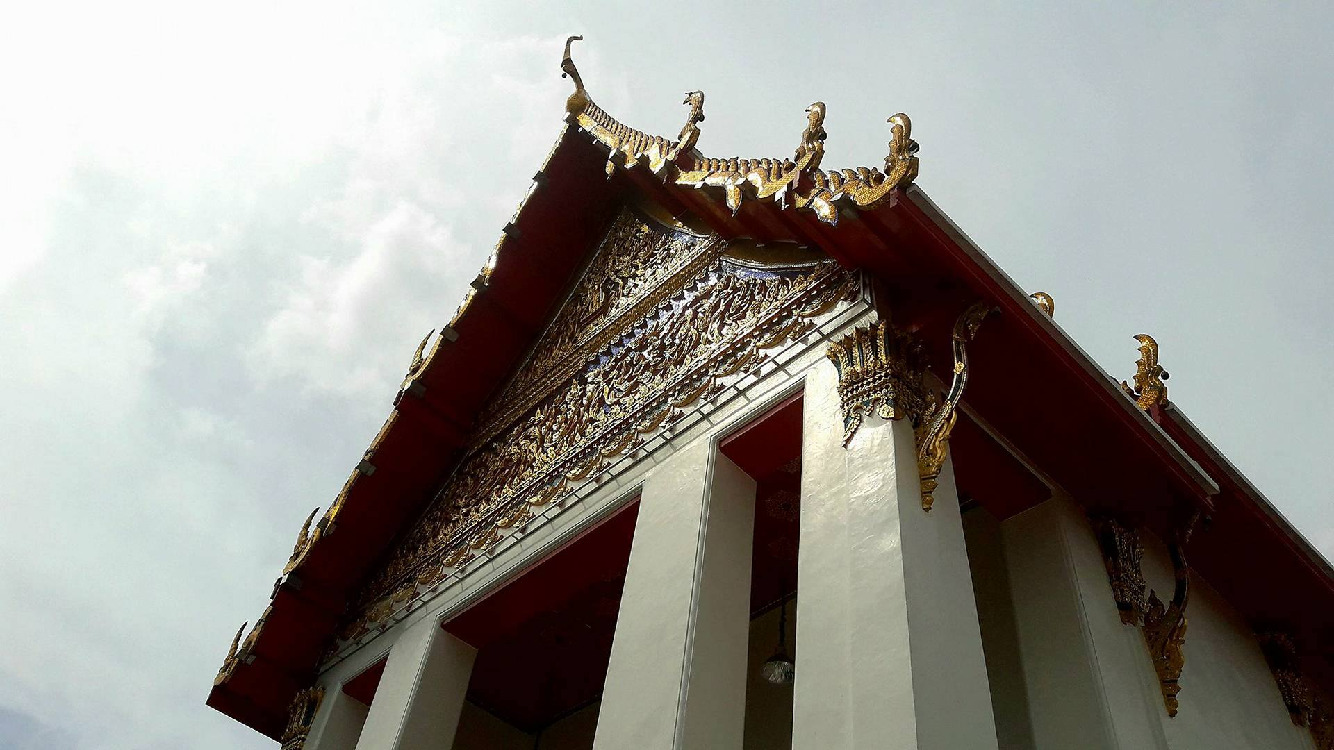 วัดนรนาถสุนทริการาม เป็นพระอารามหลวงชั้นตรี ชนิดสามัญ